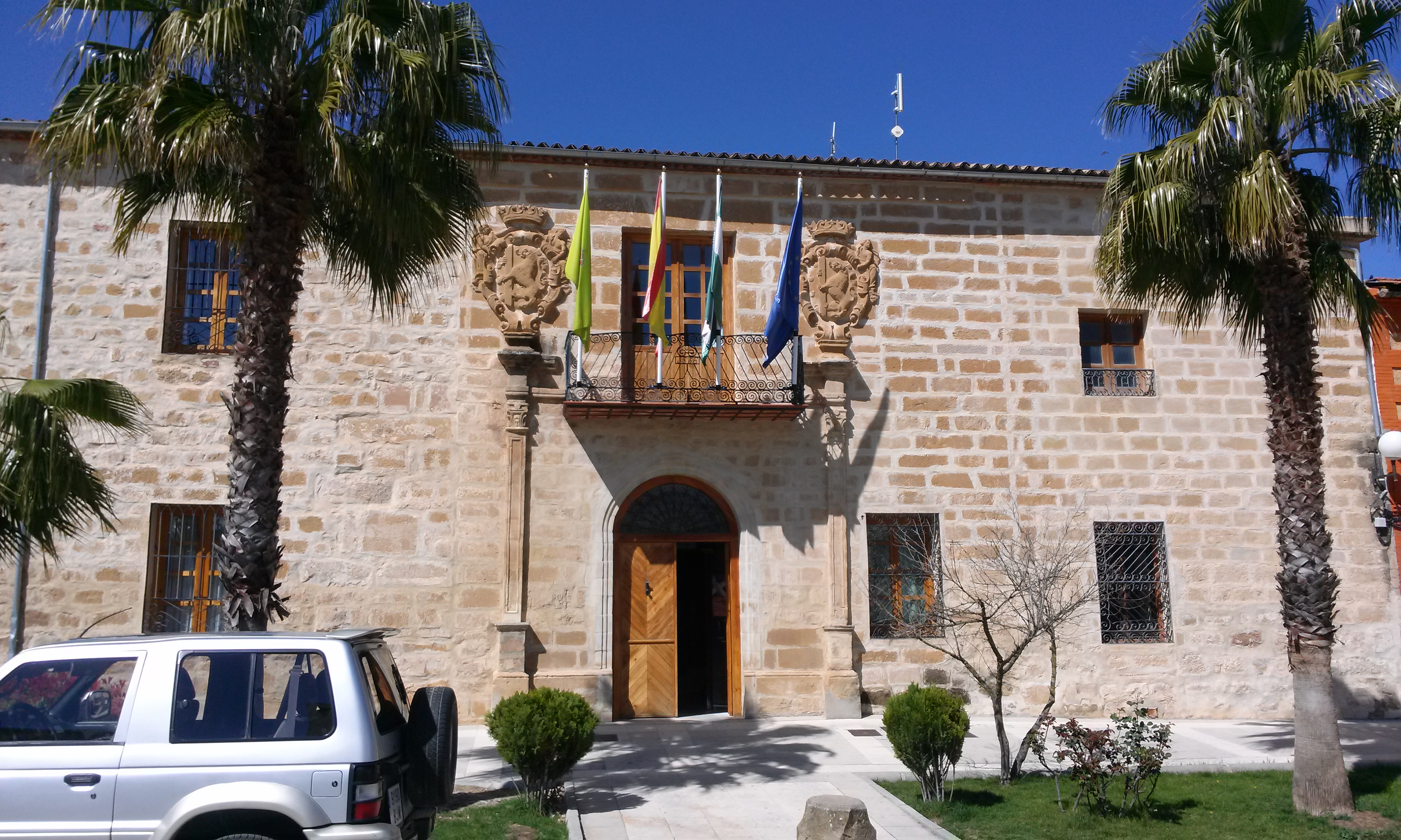 Una de las portadas del Palacio de Jabalquinto, del siglo XVI.